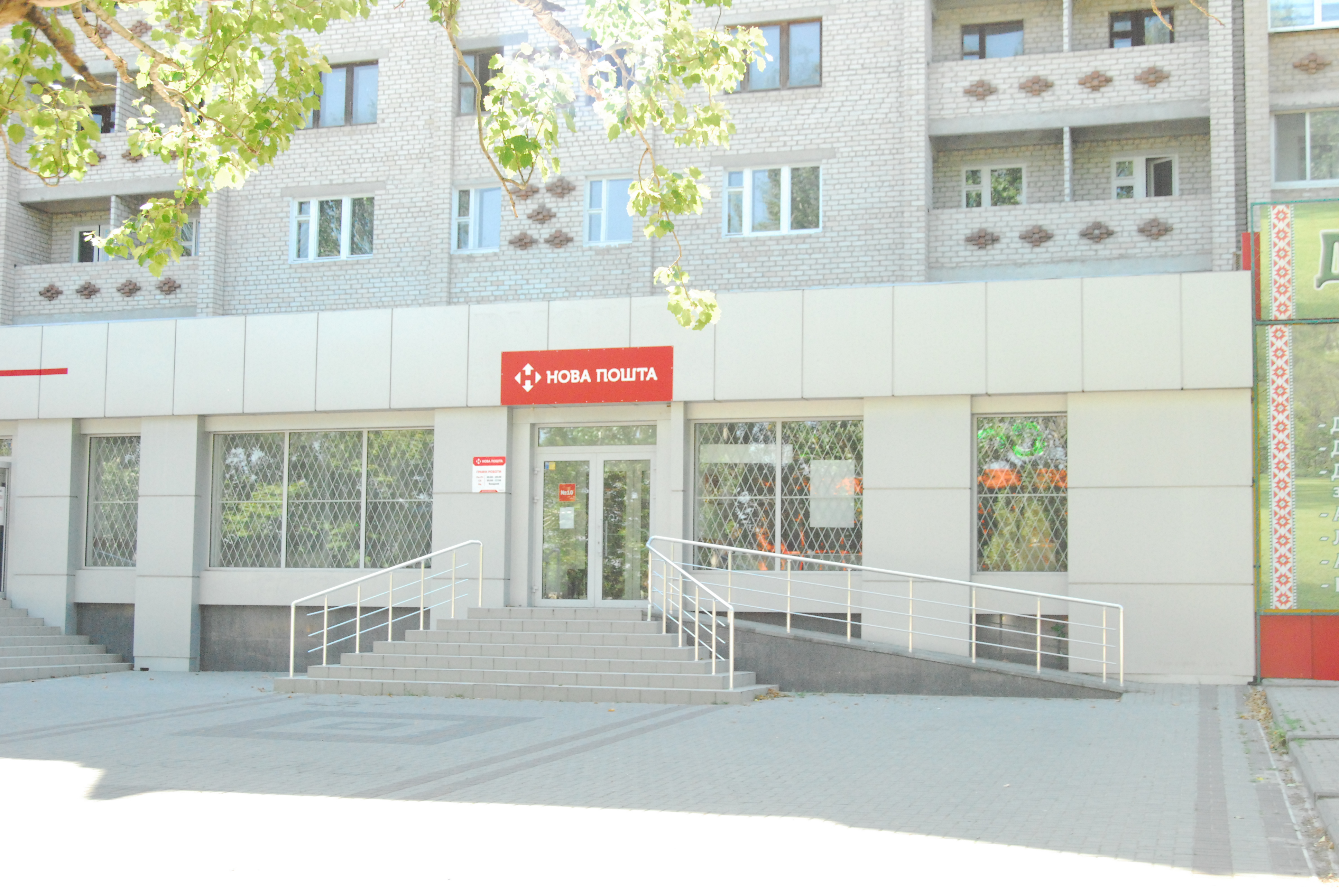 г. Мелитополь